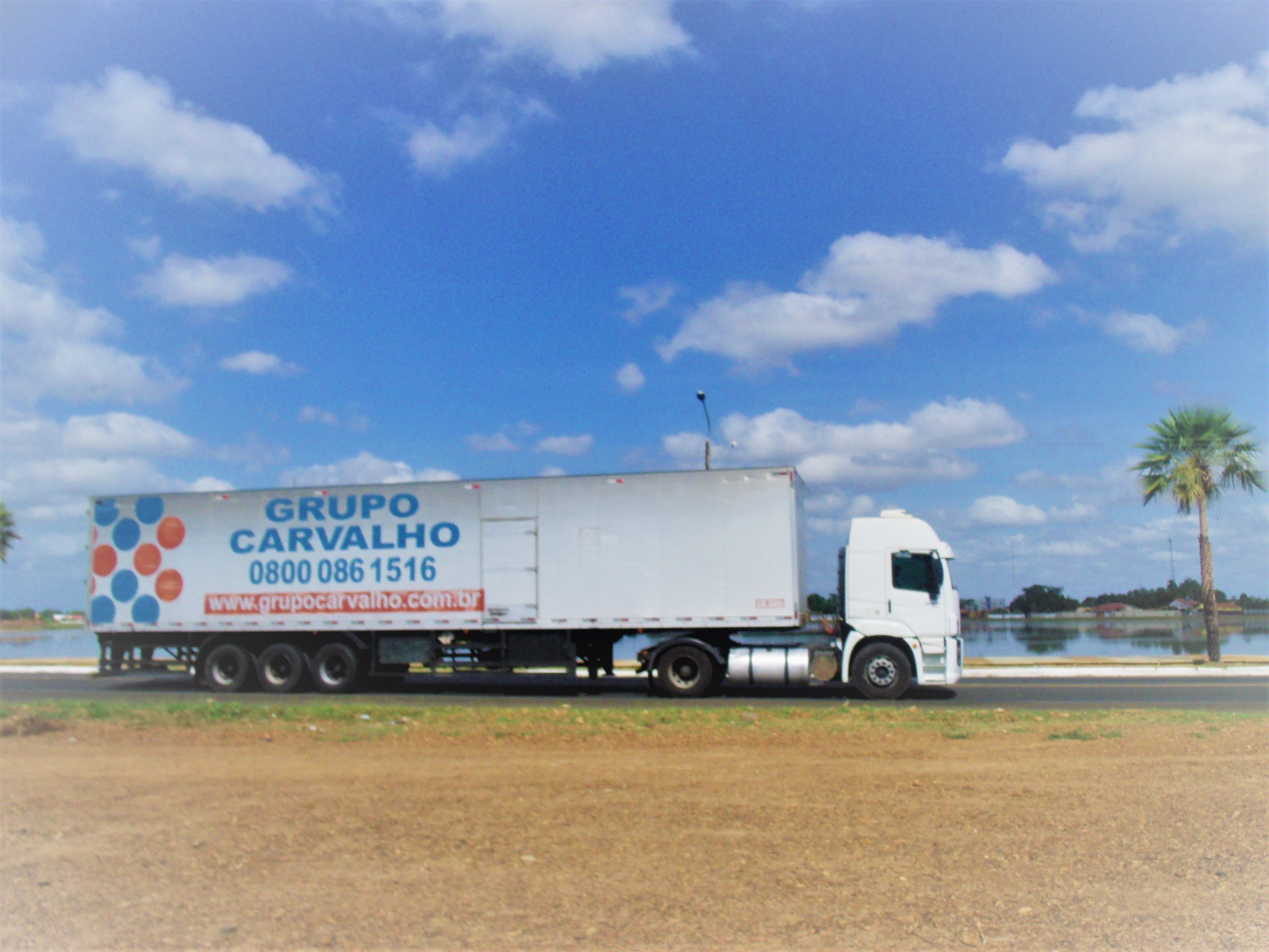 Carreta trafegando em rodovia federal, BR-343.